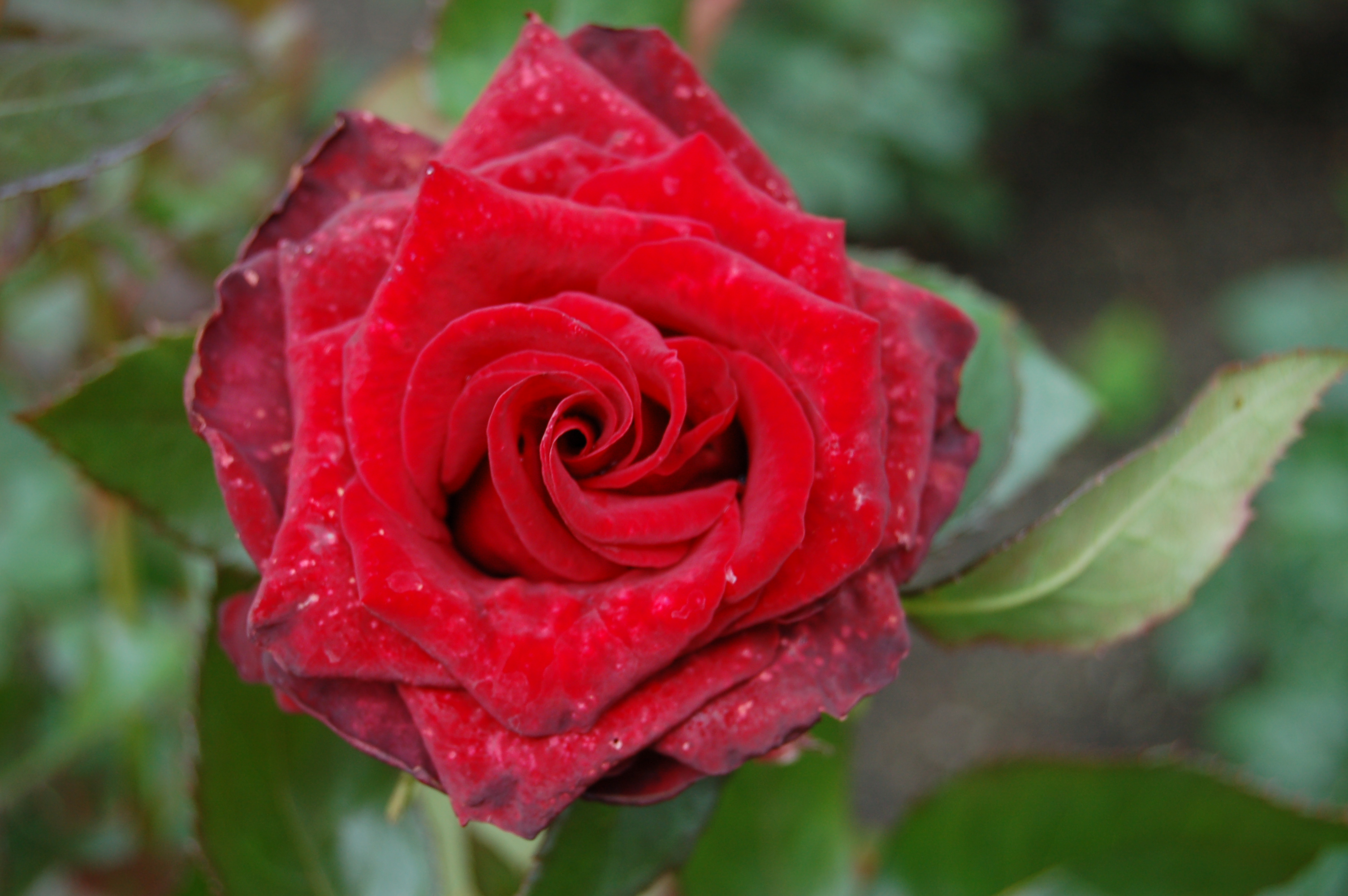 Rosa 'Black Magic'